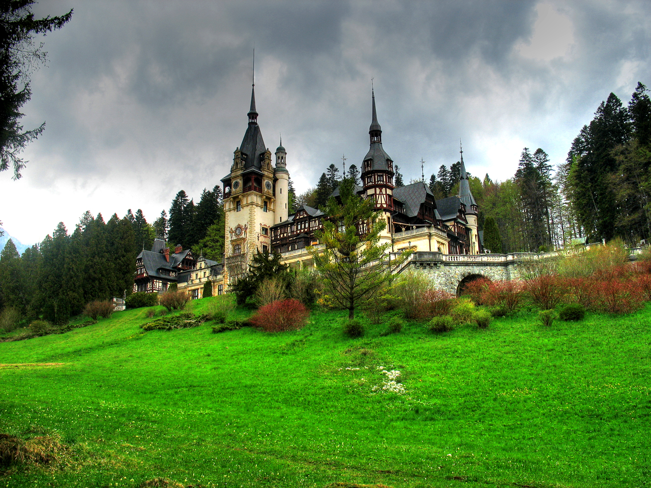 Peles Castle, Sinaia, Romania 01